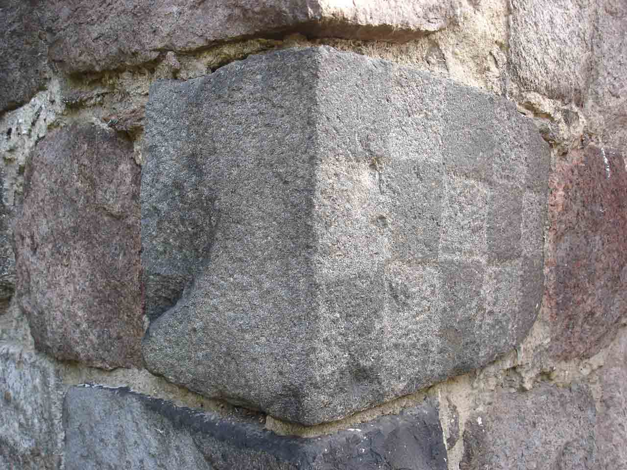 Nærbillede af skakbrætsten på Hönow kirke i tårnets SV-hjørne - stenen har kun mønster på én side